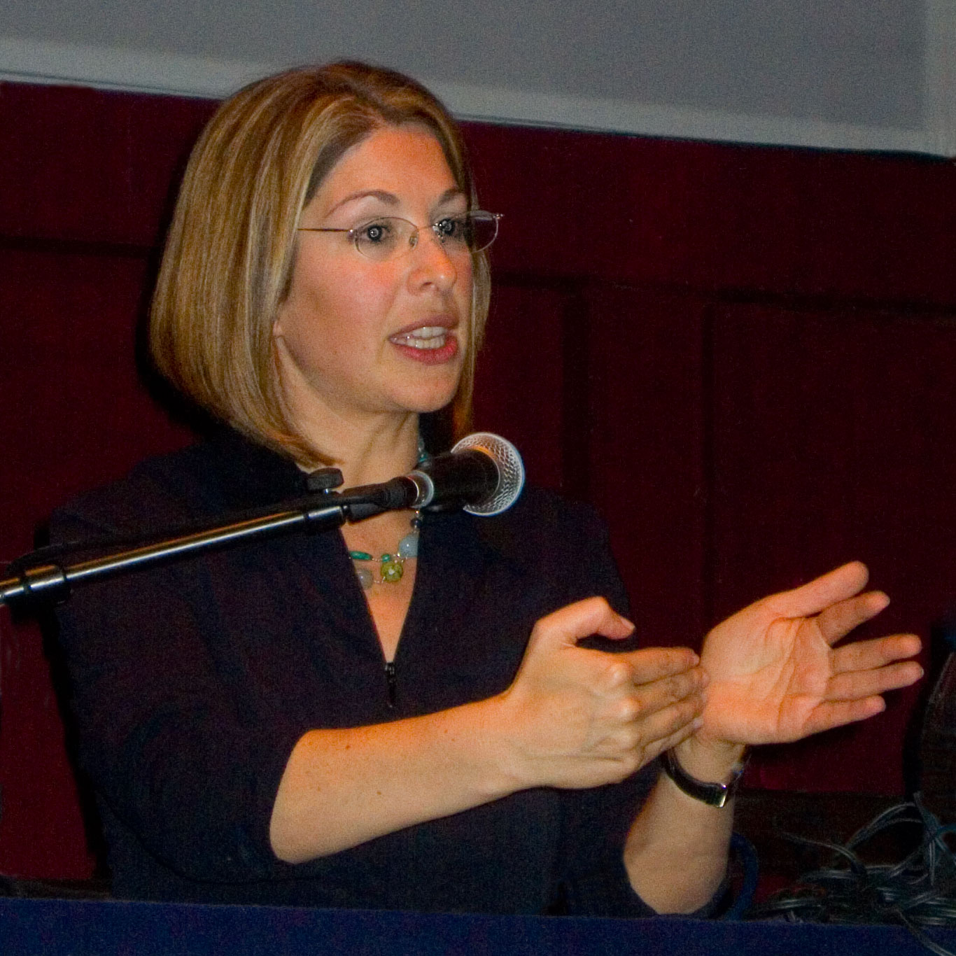 Naomi Klein beantwortet eine Frage aus dem Publikum zu ihrem Buch "Die Schock-Strategie: Aufstieg des Katastrophenkapitalismus" auf einer Veranstaltung im Festsaal Kreuzberg in Berlin. Naomi Klein répondant à une question du public lors d'un débat sur son livre "The Shock Doctrine - The Rise of Disaster Capitalism" à Berlin. Naomi Klein answering a question from the audience in a debate about her book "The Shock Doctrine - The Rise of Disaster Capitalism" in Berlin, Germany.